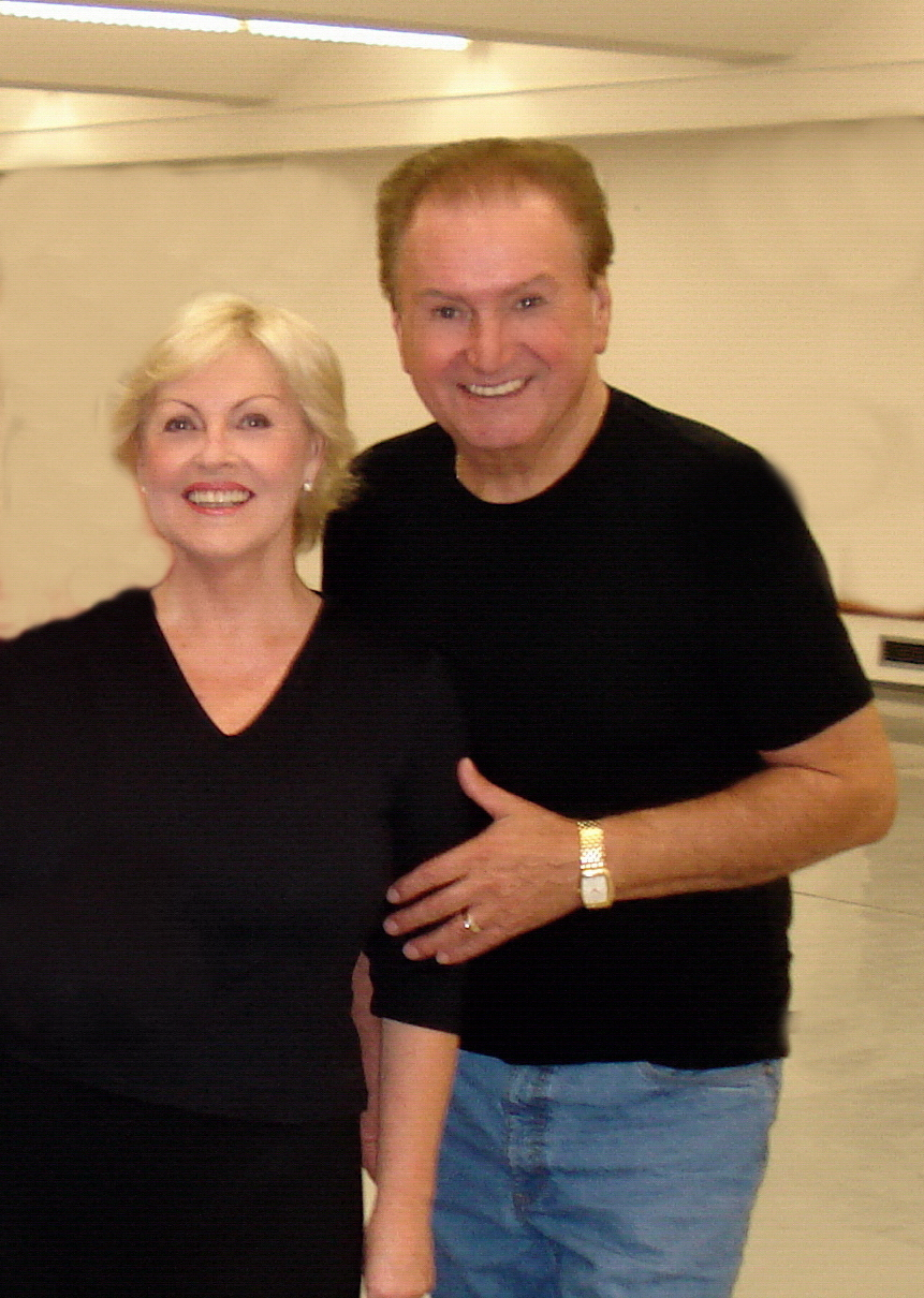 Petra Kusch-Lück und Ehemann Roland Neudert bei einer Tanzprobe im Ballettsaal des Dt. Fernsehballetts des MDR.